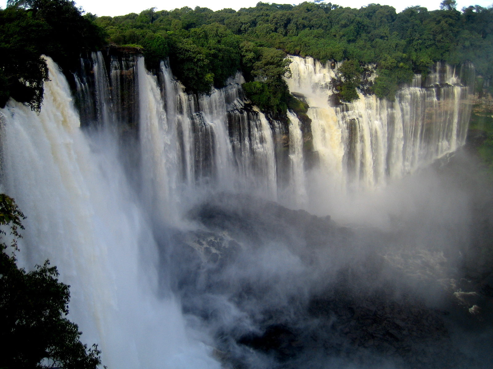 Kalandula waterfalls, Lucala river, Malange, Angola